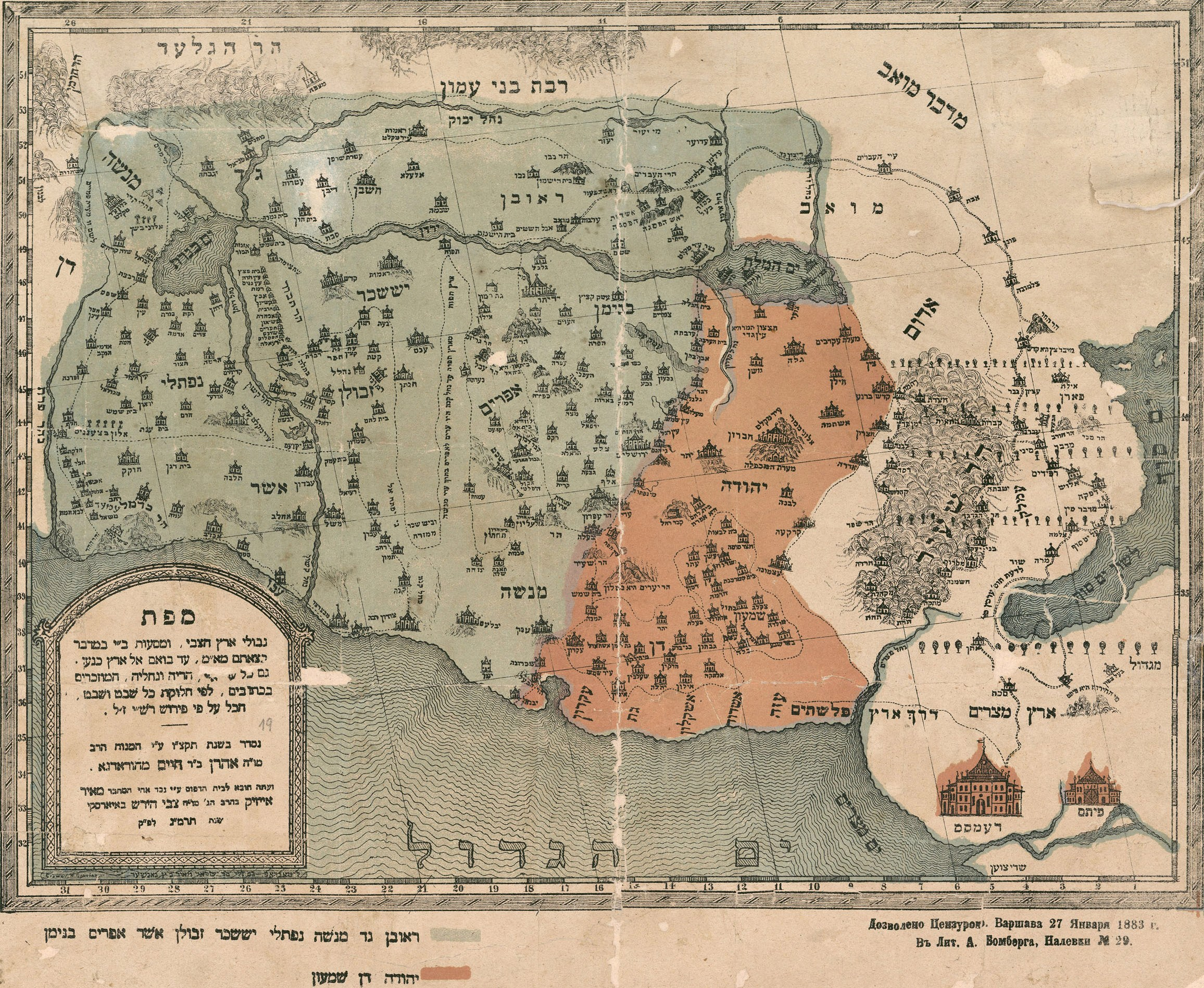 אהרון בן חיים מגרודנו. פרסם בשנת 1836 "ספר מורה דרך", מדריך לארץ ישראל שבו מודפסת מפה ציורית בשם: "מפת גבולי ארץ הצבי ומסעות בני ישראל במדבר בצאתם מארץ מצרים עד בואם אל ארץ כנען גם כל ערי א"י, הריה ונחליה המוזכרים בכתובים, לפי חלוקת כל שבט ושבט, הכל על פי פירוש רש"י ז"ל". המפה צוירה והוצאה לאור יותר מאוחר ע"י נכד אחיו מאיר אייזיק בויארסקי. ורשה שנת תרמ"ג 1883